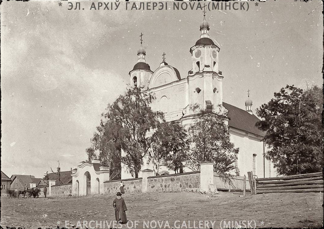 Беларуская (тарашкевіца): Васілішкі (Vasiliški), пляц Рынак (plac Rynak). Касьцёл Сьвятога Яна Хрысьцiцеля па перабудове на царкву МП